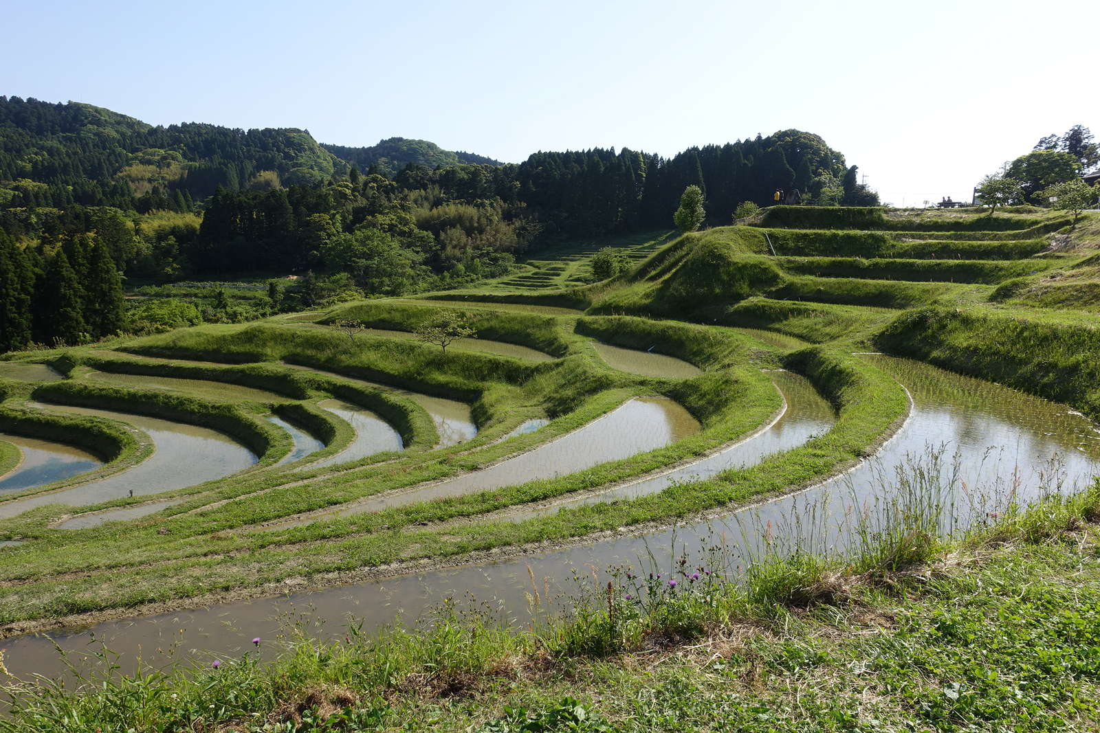 大山千枚田 千葉県鴨川市 田植え直後